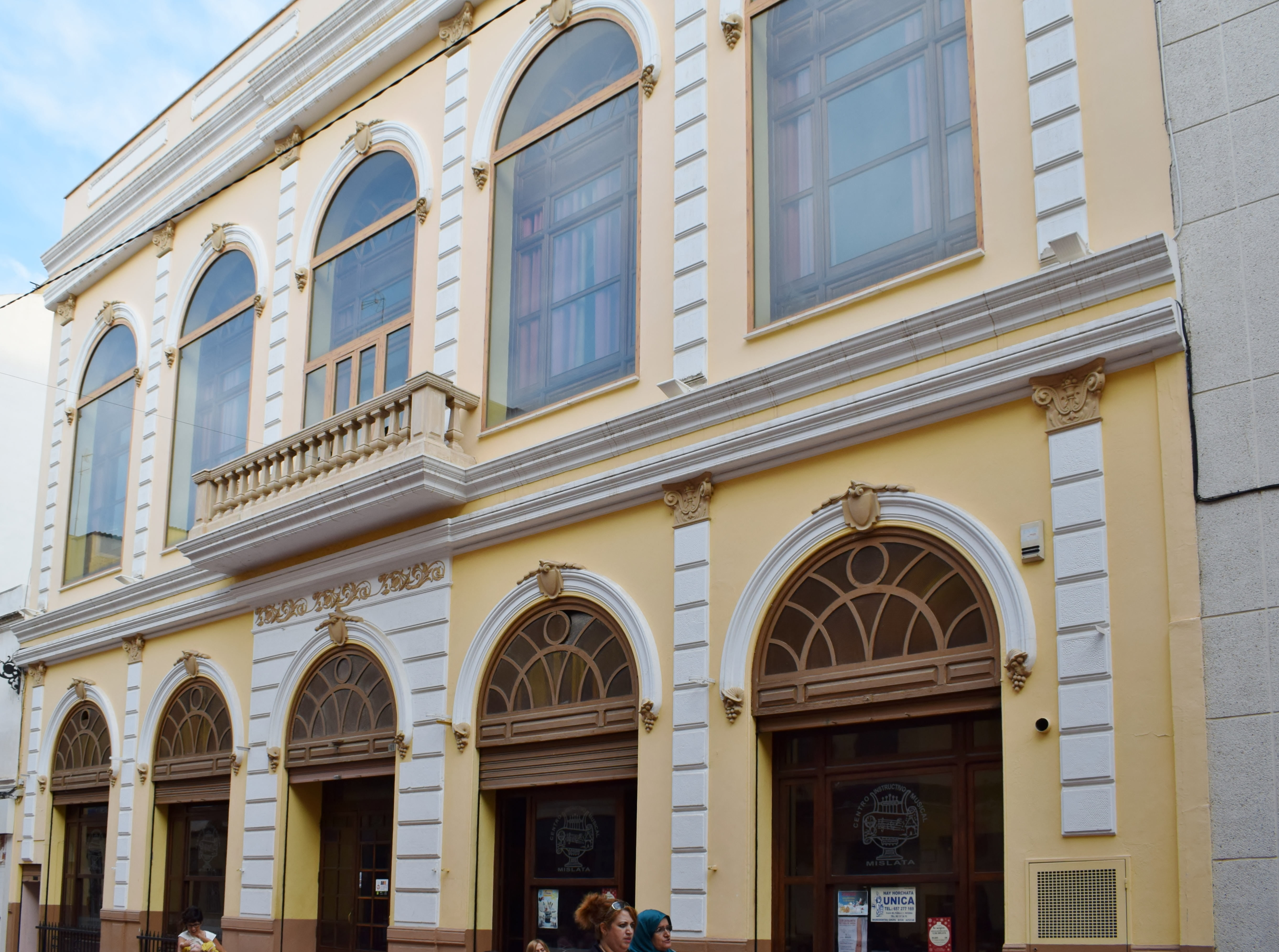 Mislata.